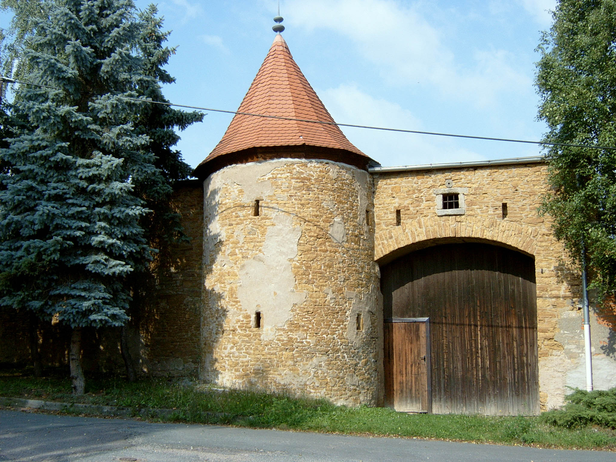 Stadtmauer Rastenberg